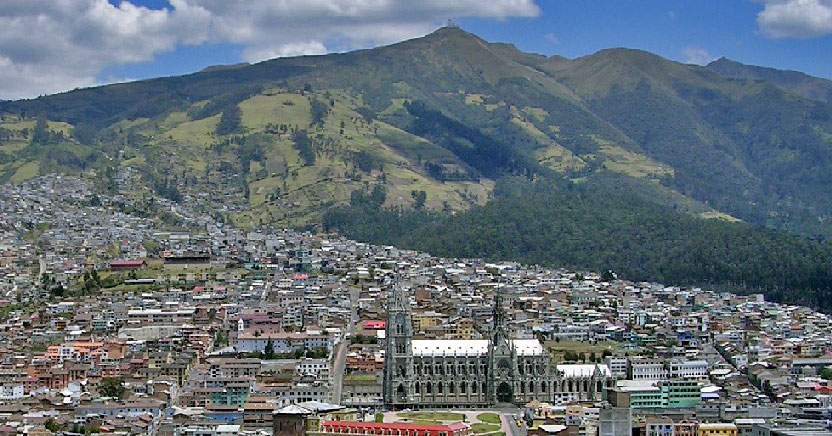 Sujet:Quito vum Itchimbia gesinn.